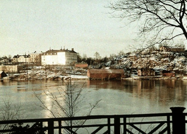 Vy över Marieberg på Kungsholmen 1926